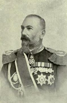 El general Milovan Pavlović, ministro de Defensa, muerto en el golpe de Estado de 1903.